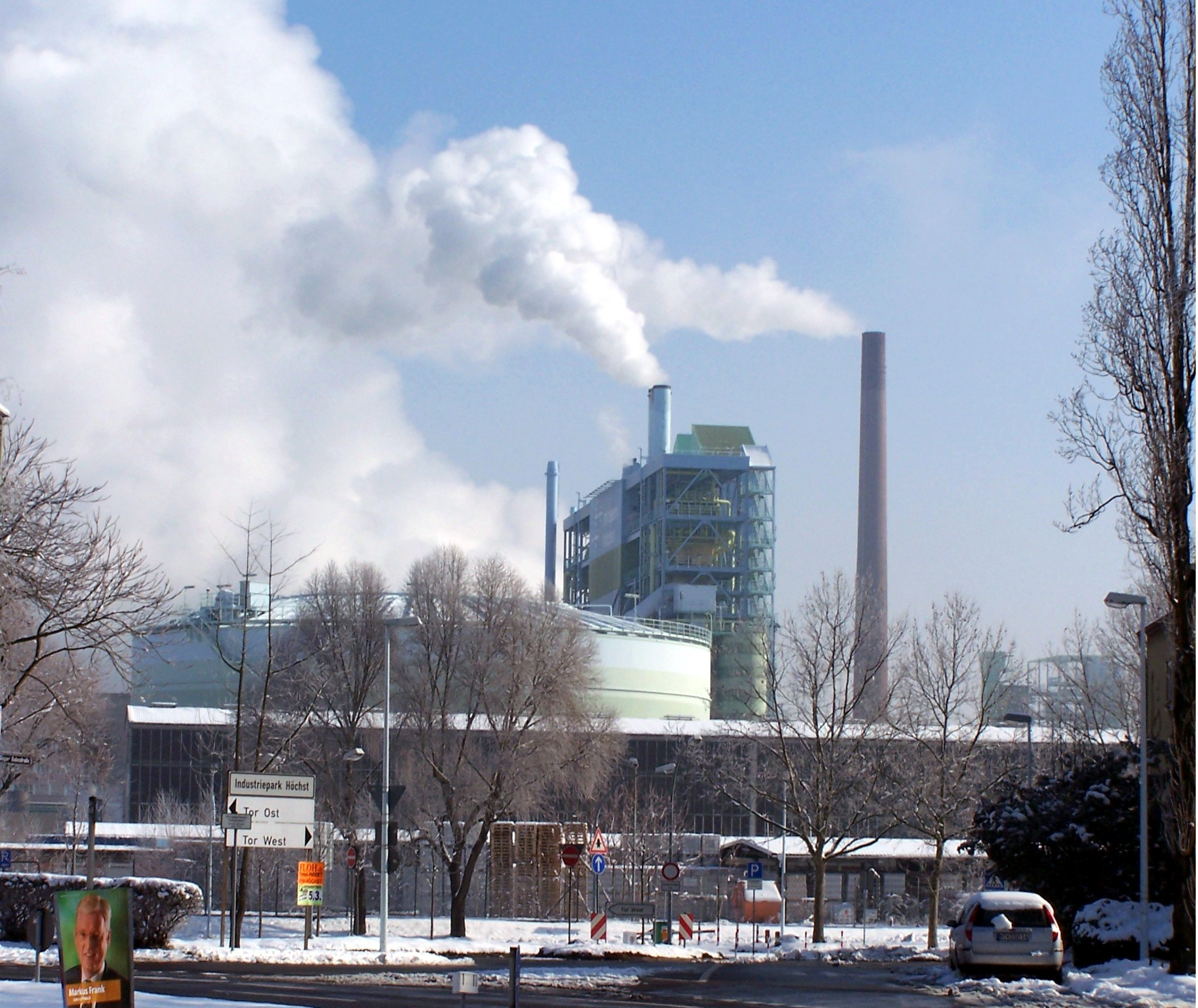 Industriepark Höchst former Hoechst AG at Gate West near Frankfurt-Sindlingen.